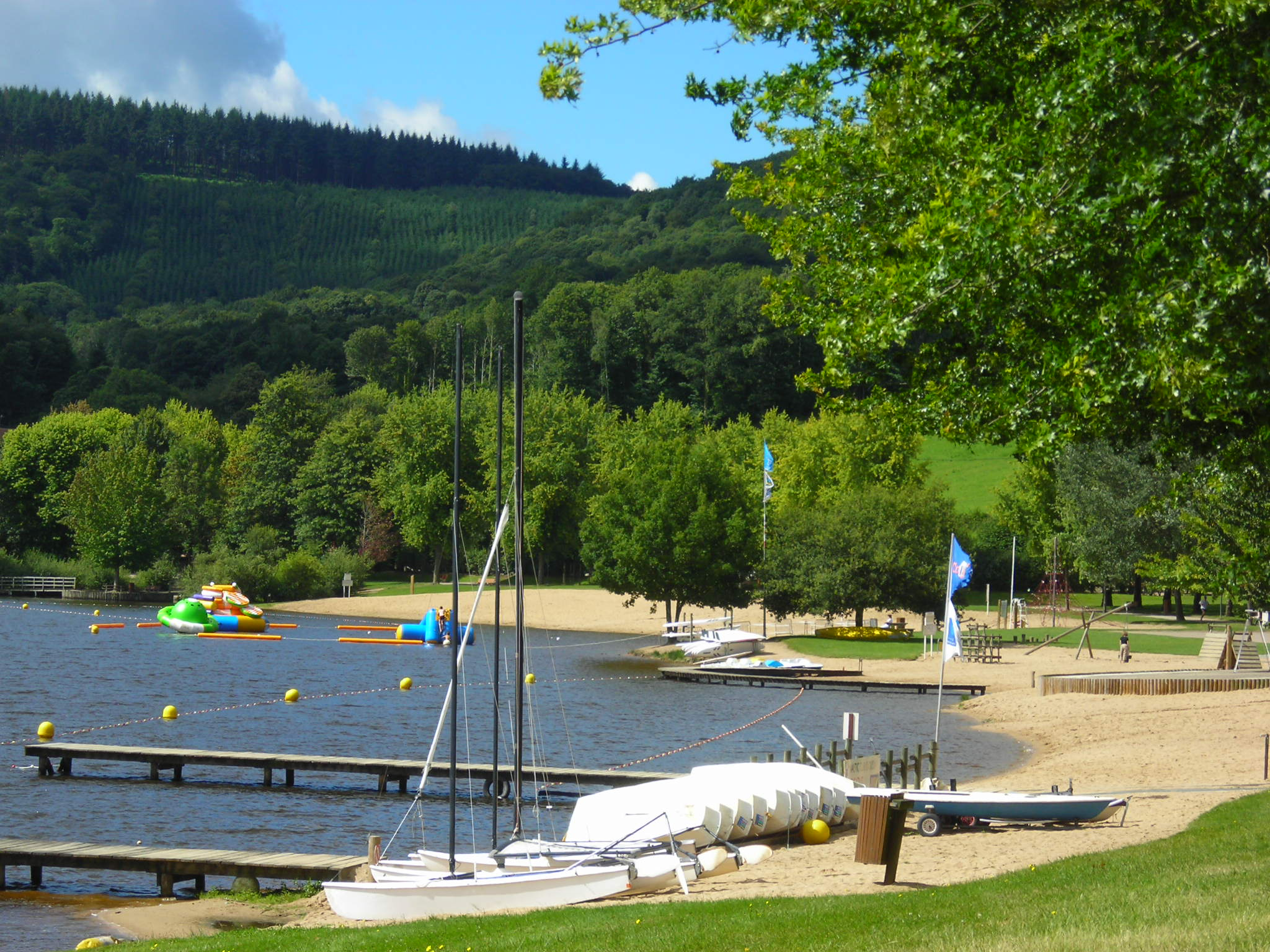 gueret courtille 56454